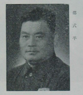 中國人民政治協商會議第一屆全體會議代表